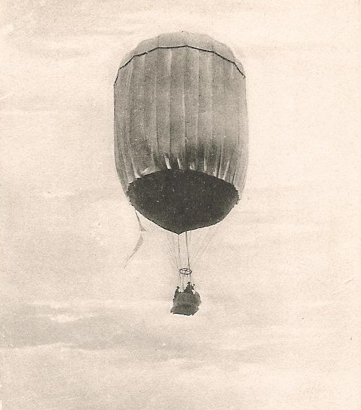 Gasballongen "Svenske", konstruerad av civilingenjören och kaptenen Erik Unge. Slet sig 1903-02-15 efter endast 4 flygningar. Återfanns aldrig.